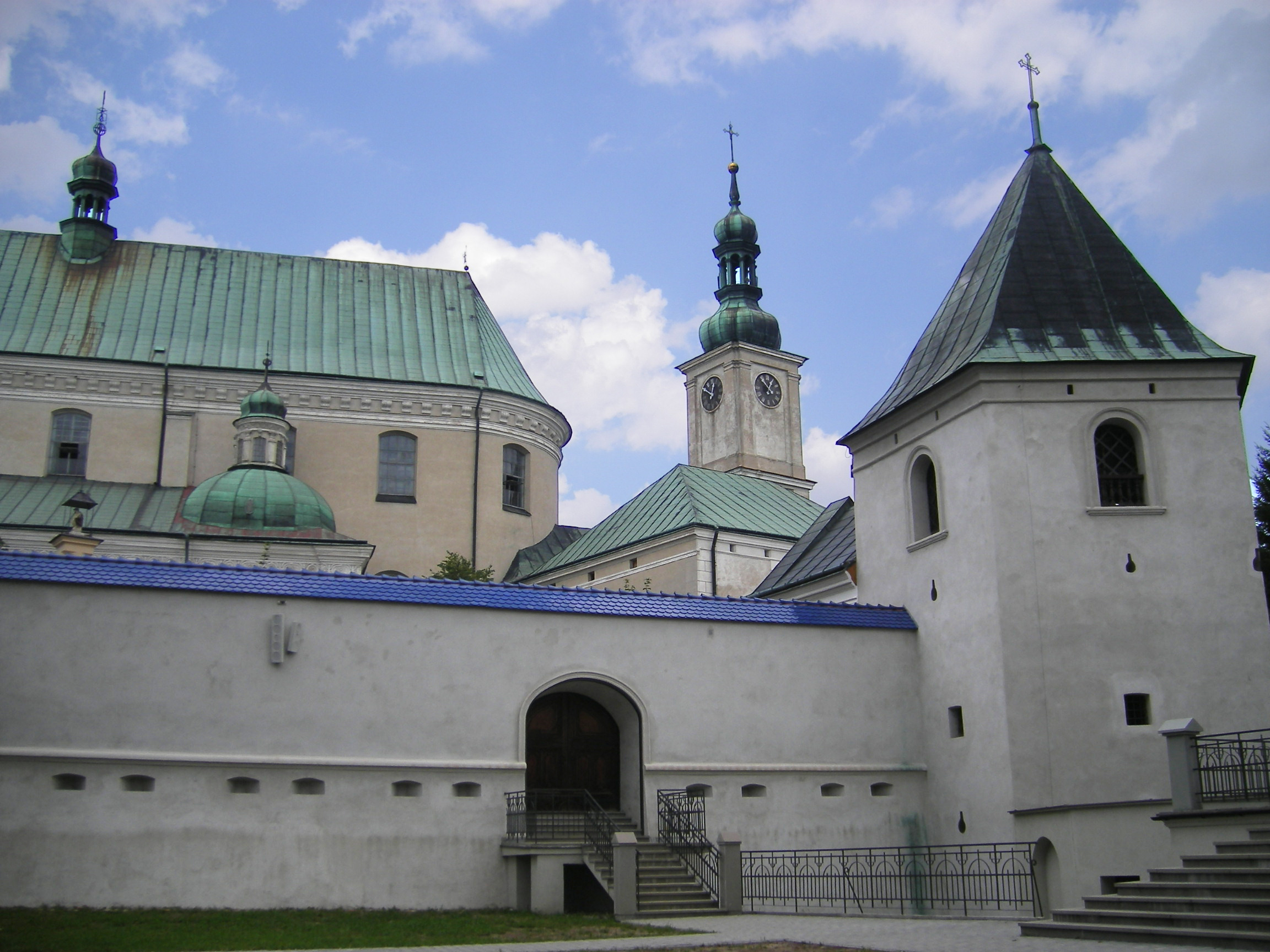 Leżajsk, Bernardine Monastery